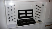 Spielschrank der Orgel in der Evang. Friedenskirche Jawor (PL)